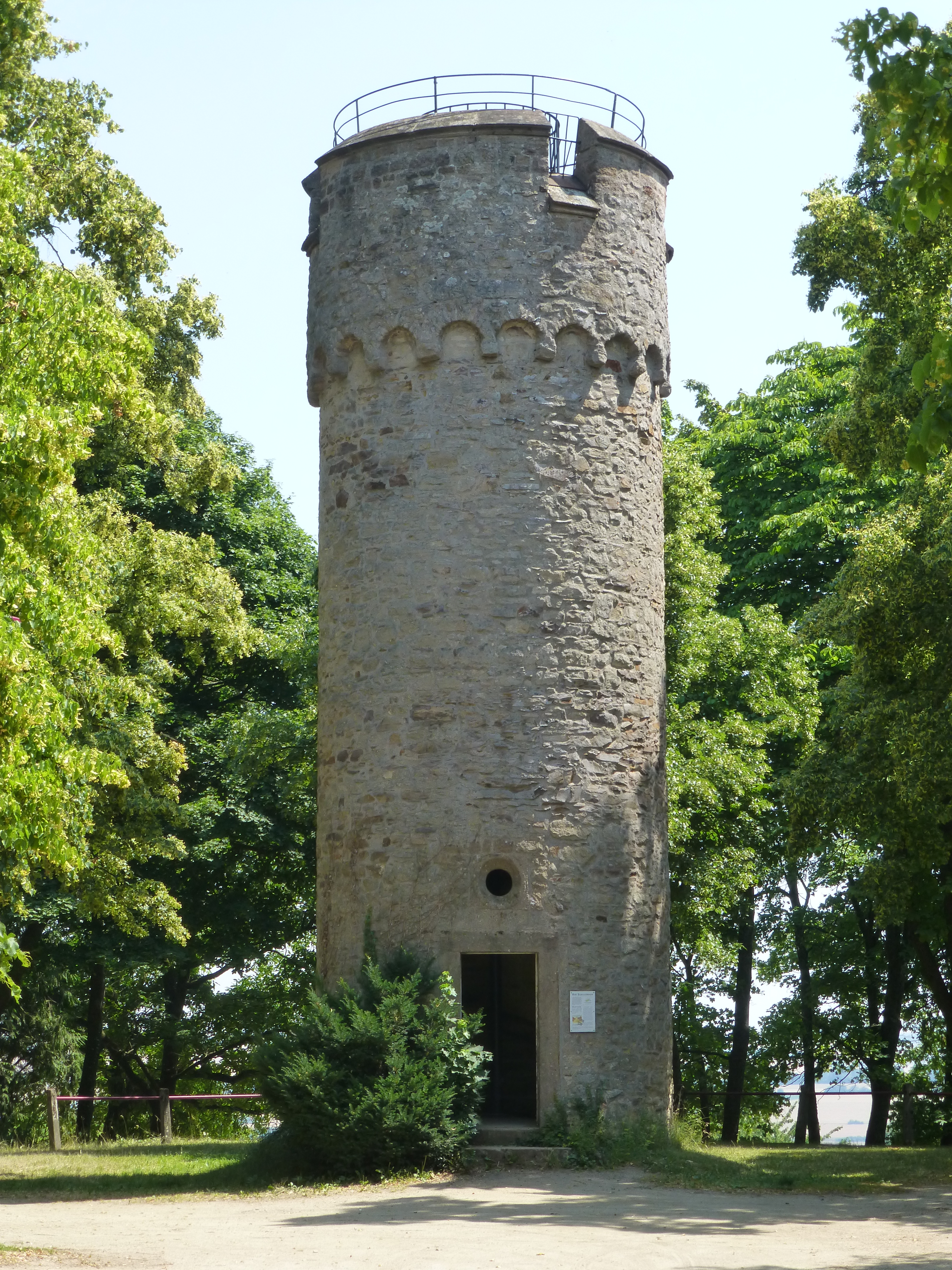 Der Wartturm im Ortsteil Schillerhain